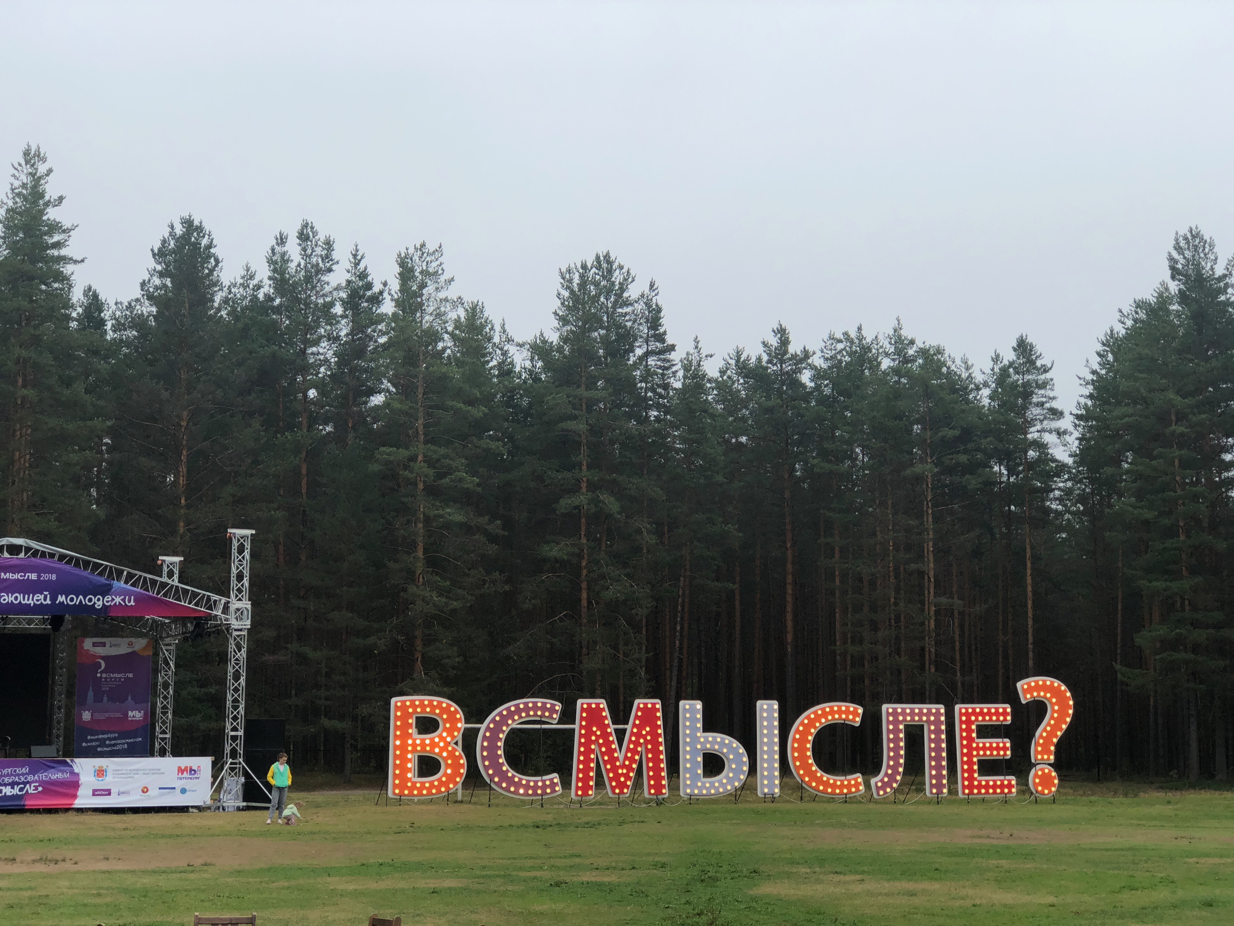 Куйвозовское поселение